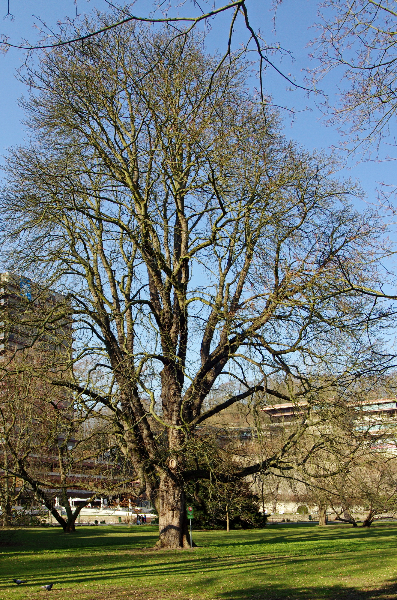 památný strom Antonín (jírovec maďal) v Dvořákových sadech v Karlových Varech